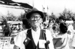 poema epifanio